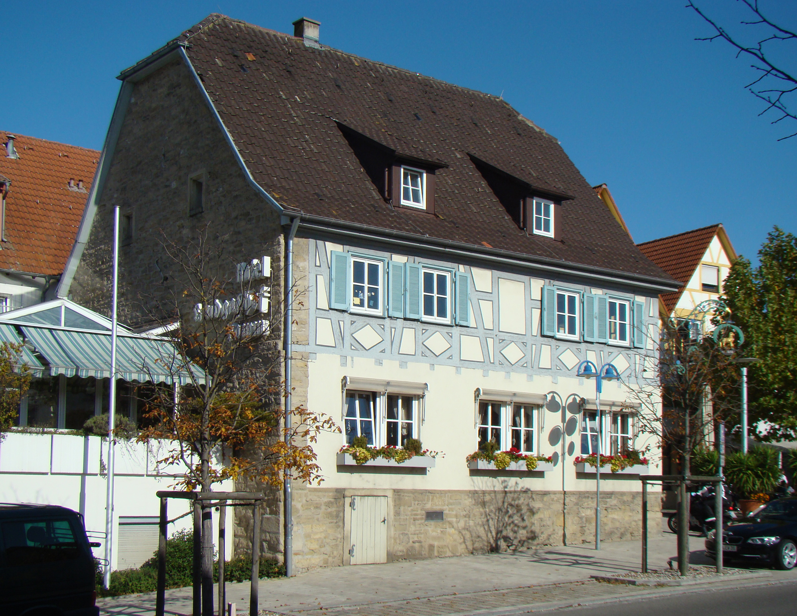 Gasthof Lamm in Asperg.